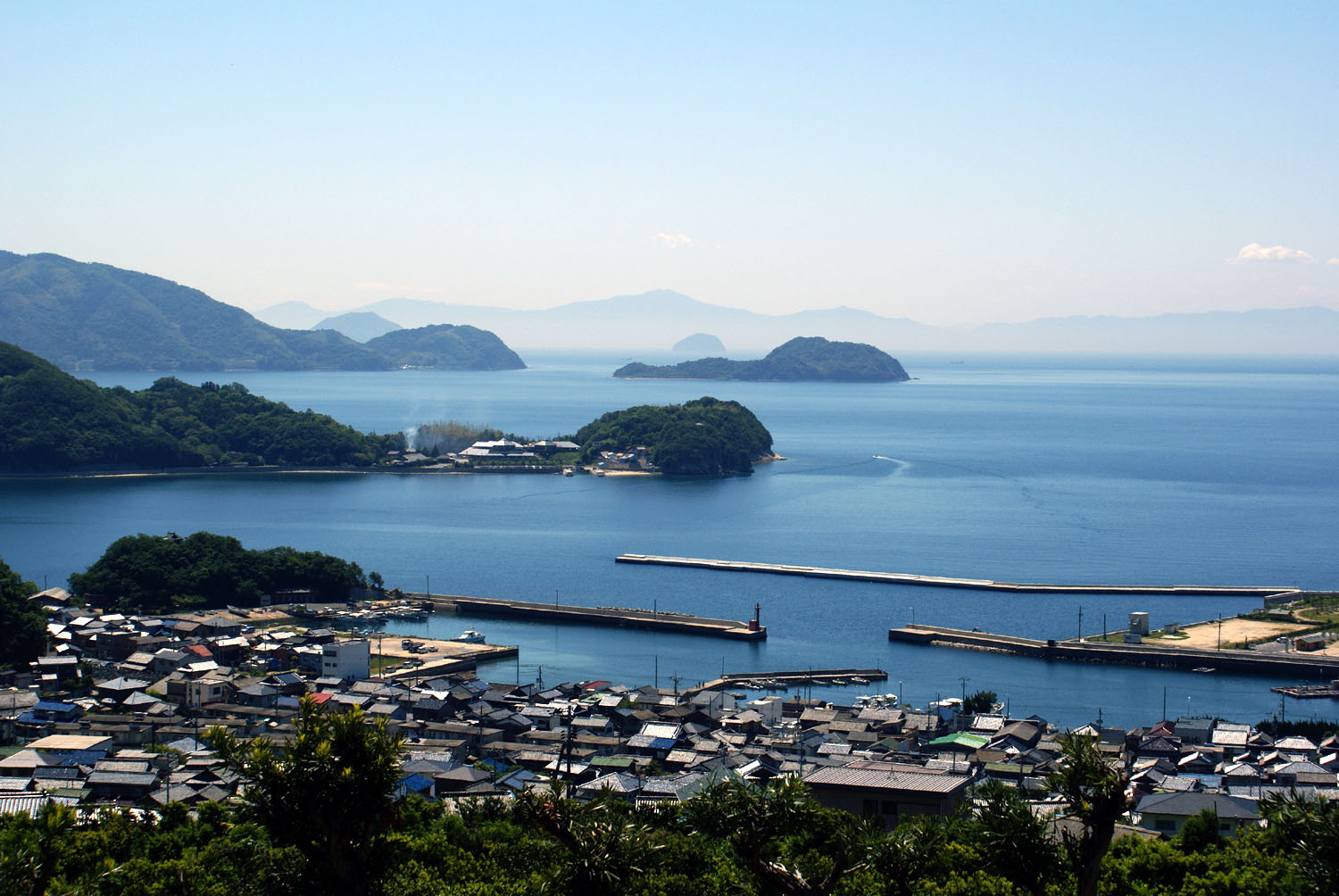 Setonaikai landscape,Suo Oshima